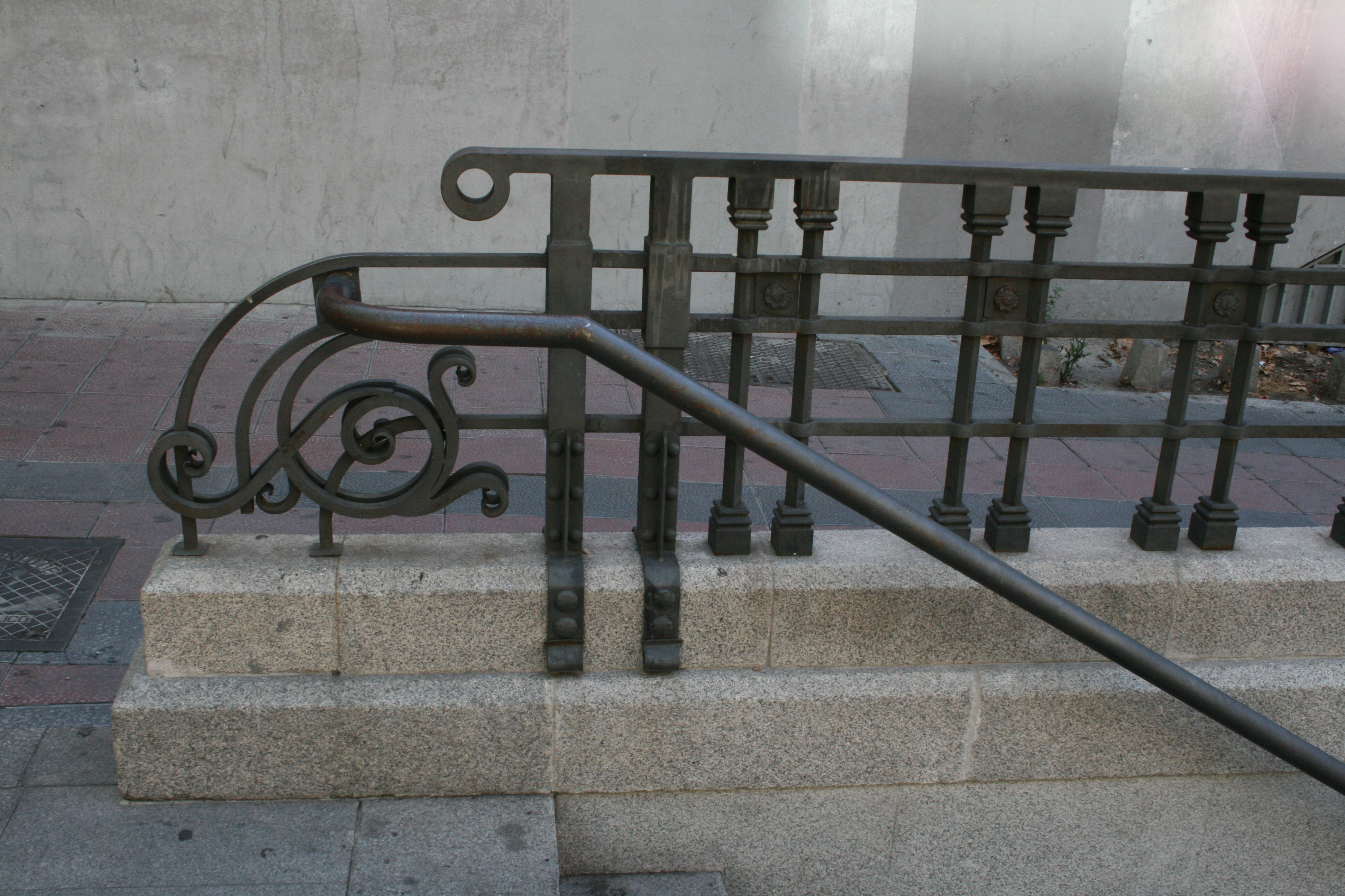 Diseño de las bocas de Metro de Madrid - Antonio Palacios